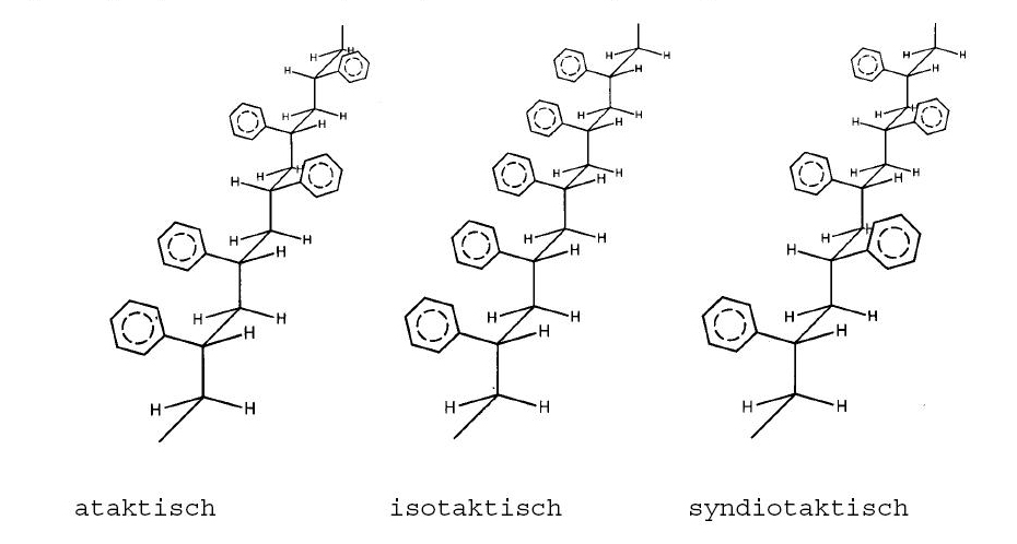 polystyrol iso- syndio- und ataktisch